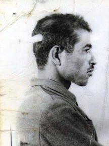 الشهيد أحمد بن درميع المدعو احمد لمطروش